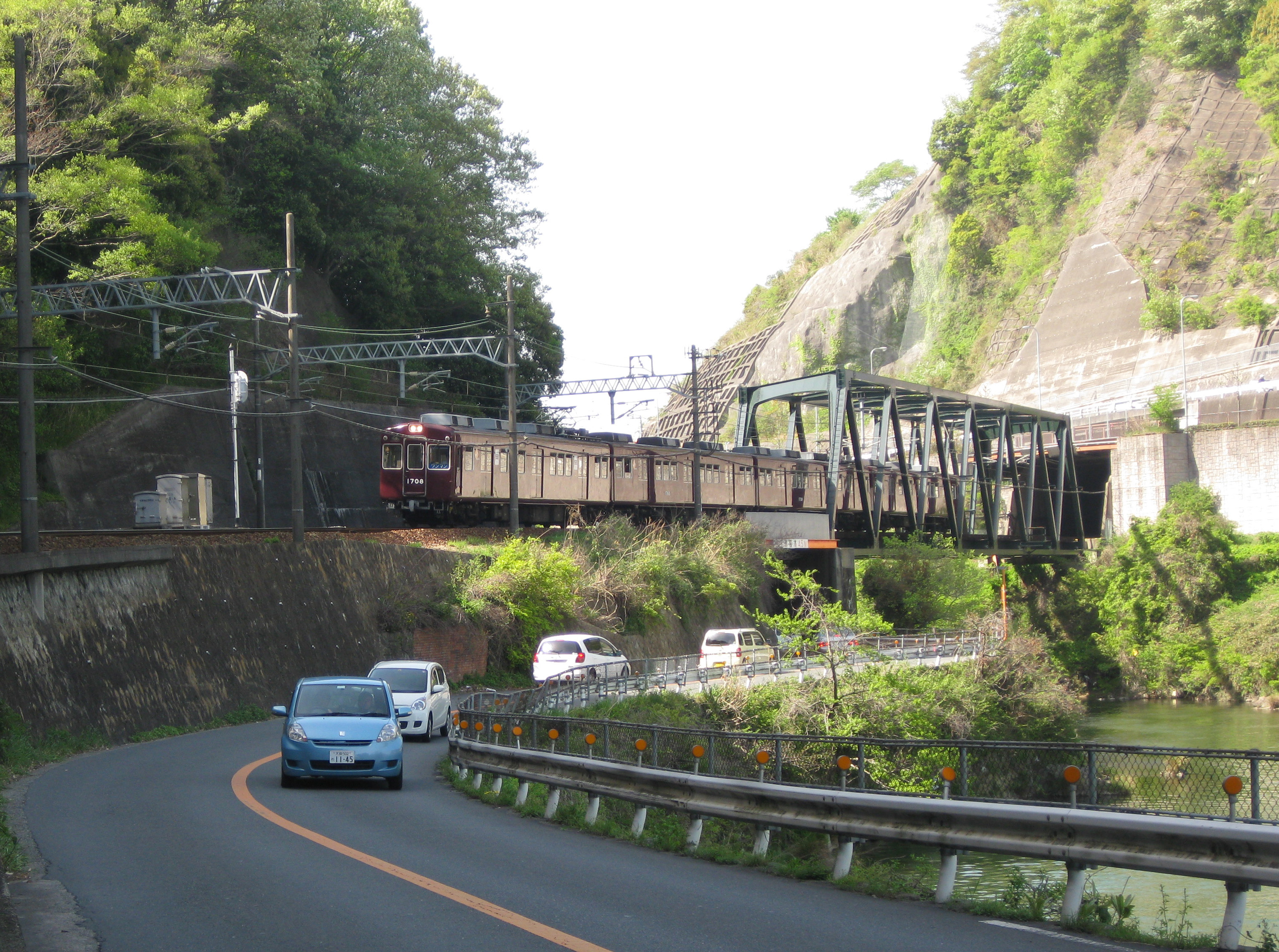 能勢電鉄妙見線